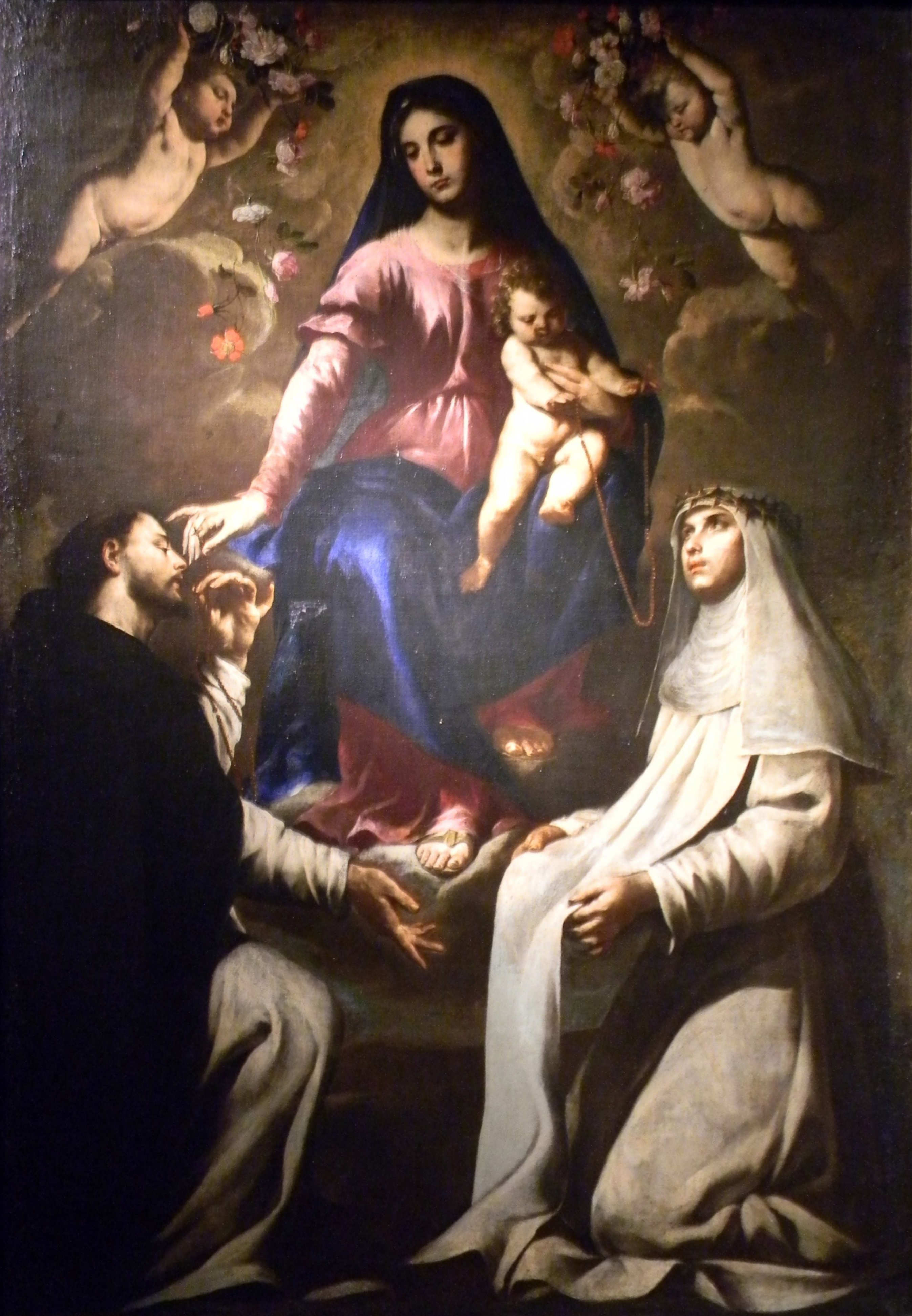 Madonna del Rosario e santi Domenico e Caterina di Andrea Vaccaro - Museo diocesano di Napoli